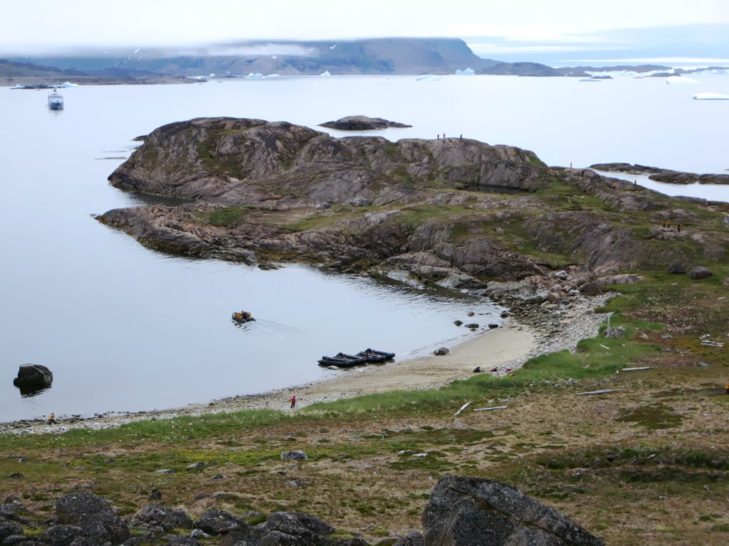 Panorama du site d'Herjolfnses.